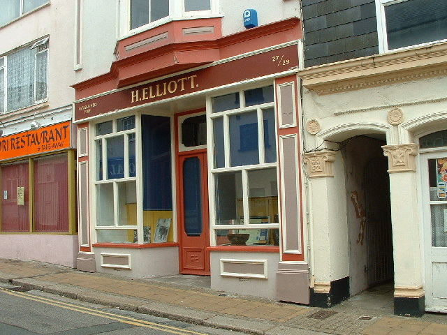 Elliott's Shop, Saltash